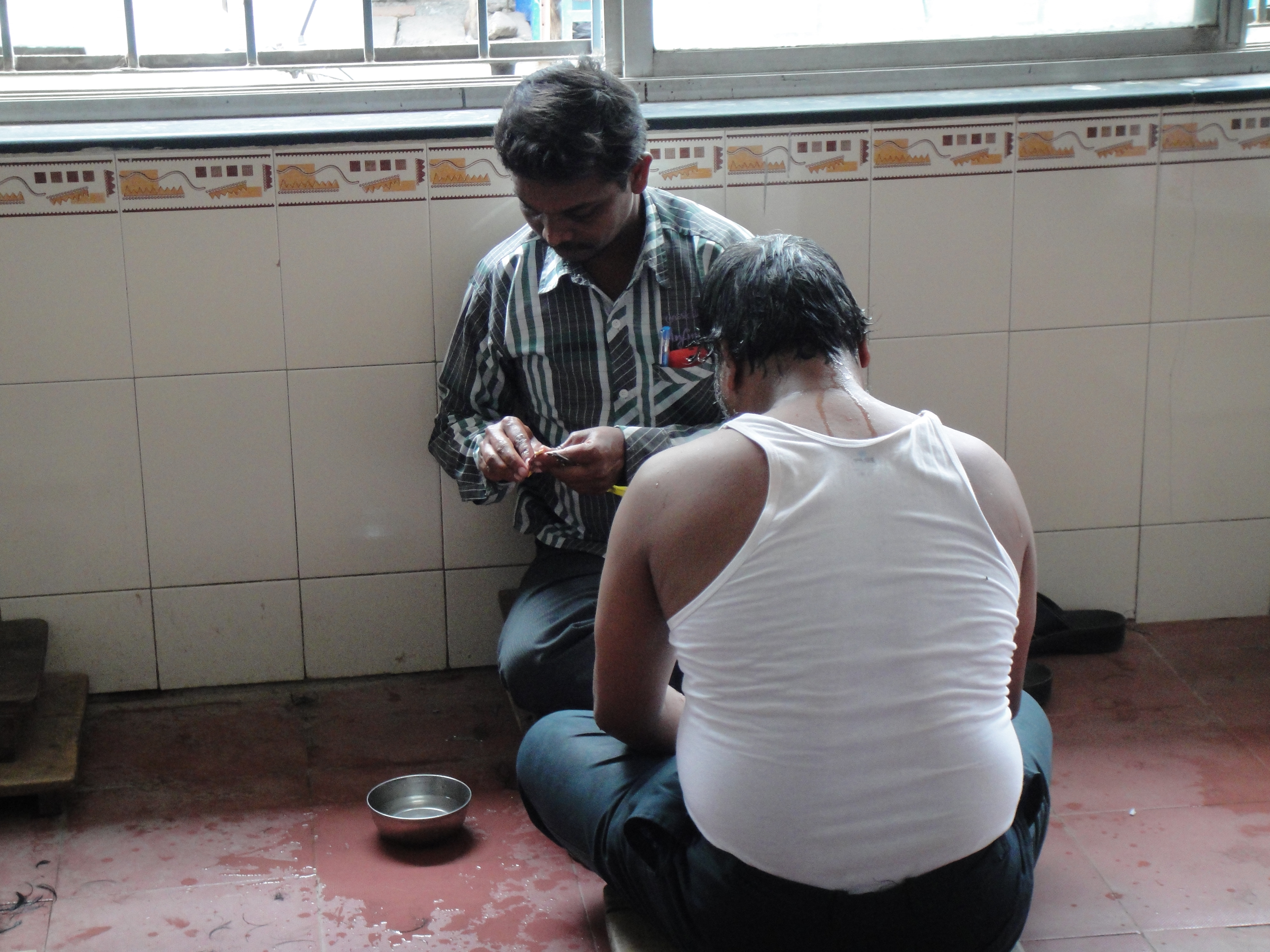 Temple de Murugan à Palani au Tamil Nadu, qui est l'un des sept temples qui lui sont dédiés